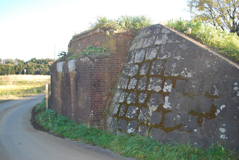 総武本線、物井-佐倉間旧線路の煉瓦造の橋台。四街道市文化財。四街道市。